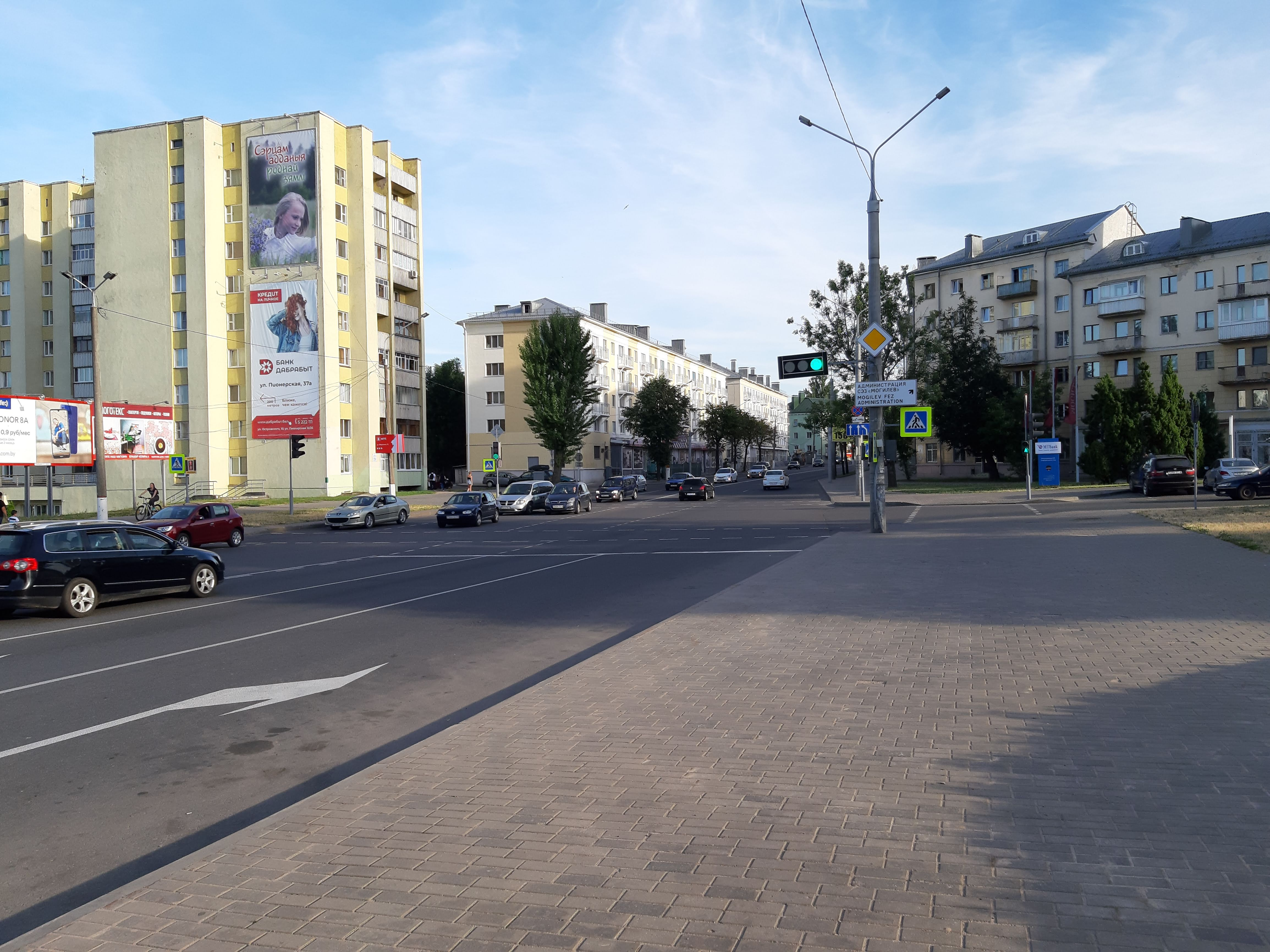 Магілёў. Піянерская ад пачатку да Арджанікідзэ